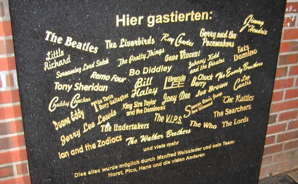 Das "Who is Who" des Rock gab sich in dem Laden die Klinke in die Hand